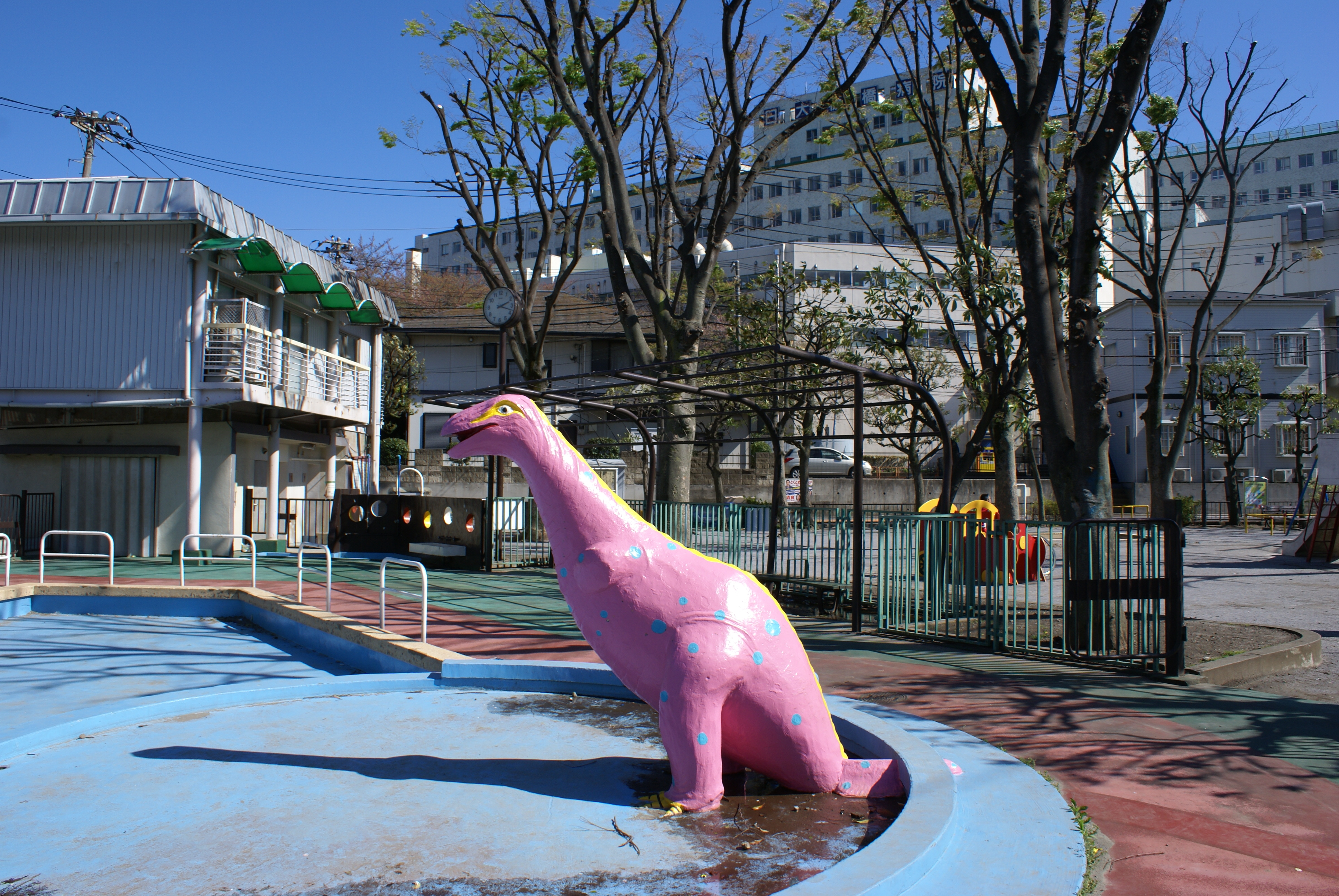 大谷口北町こどもの池